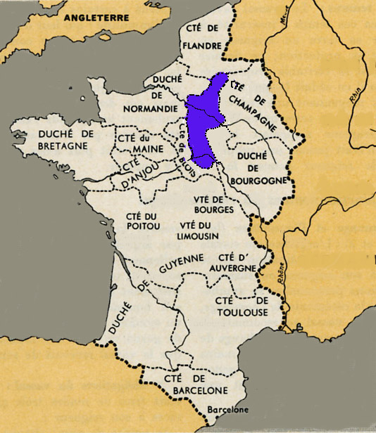 Carte de la France à la fin du X siècle. En bleu le domaine royal; on a indiqué les limites et les noms des autres grands fiefs. Le comté de Barcelone sera indépendanr de fait à la fin du IX siècle. C'est le cas aussi de la Bretagne, de la Normandie , de l'Aquitaine, etc. Utilisateur Alexandrin